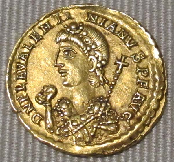 Impero d'occidente, valentiniano III, solido in oro (roma), 455